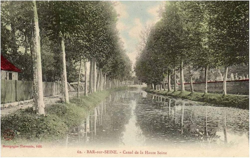 Extrémité amont du canal de la Haute-Seine comblée pour faire place à la route RD 671. 10110 Bar-sur-Seine.